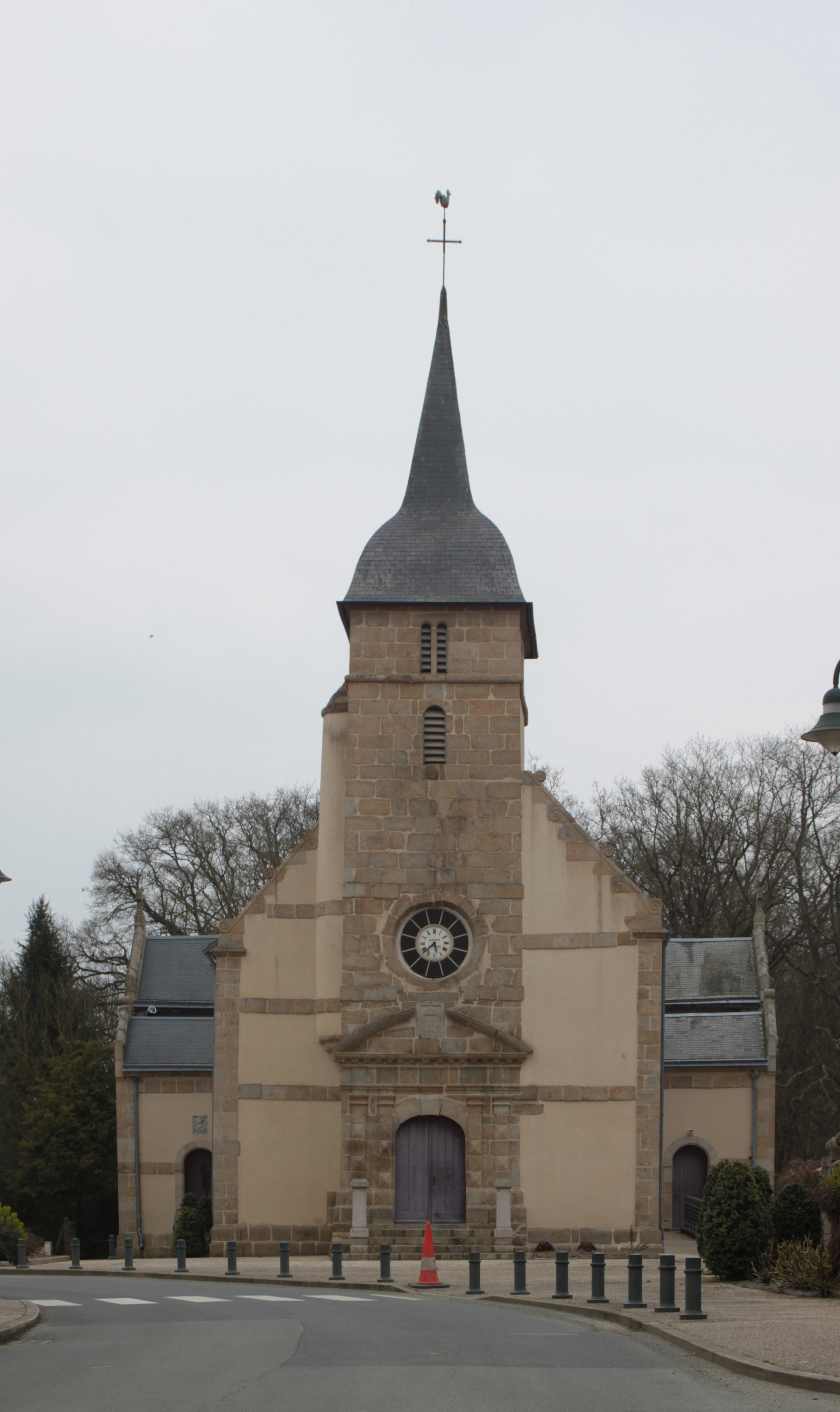 Église, Fr-85-La Rabatelière..